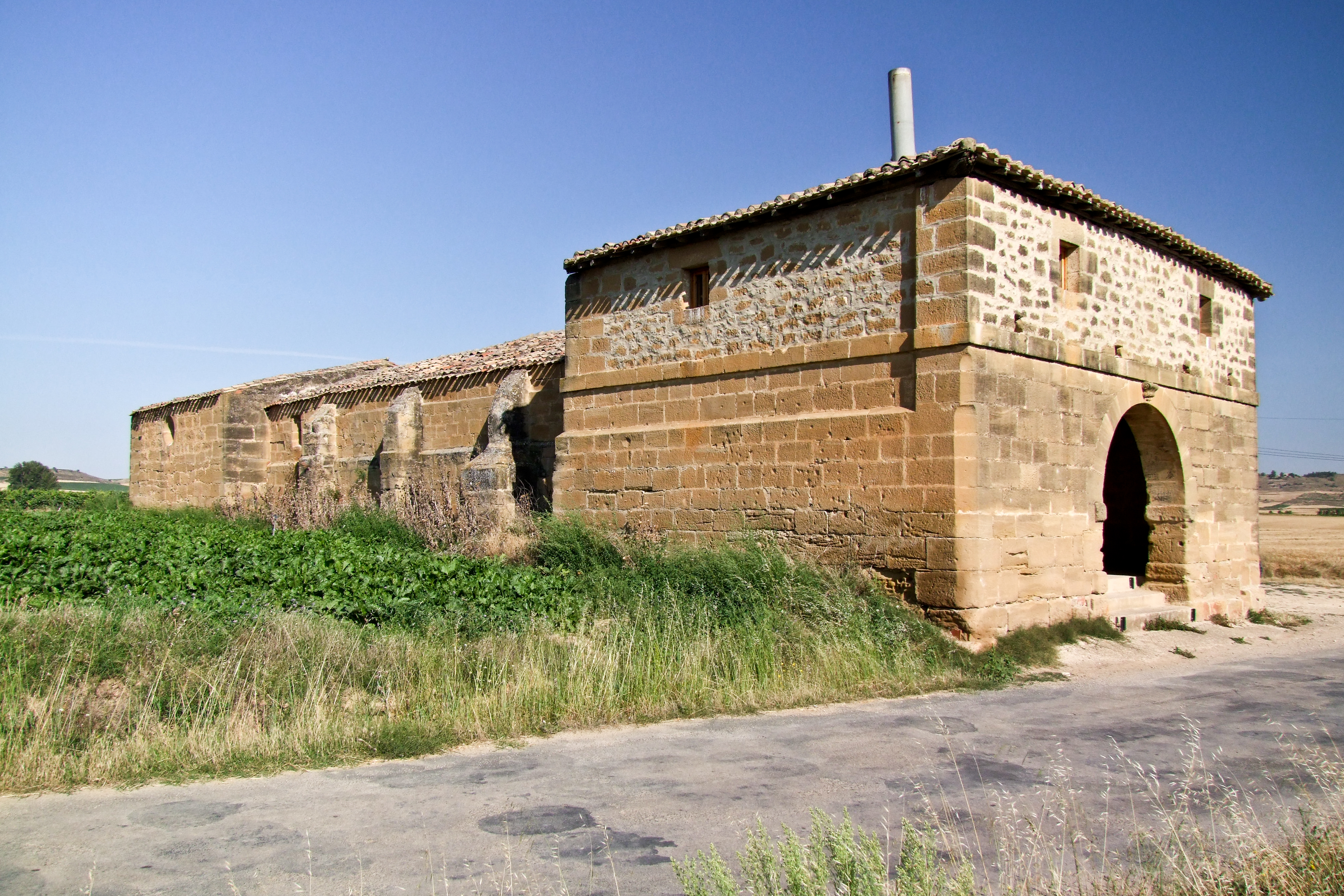 Ermita de la Concepción en la localidad de Briones, La Rioja - España